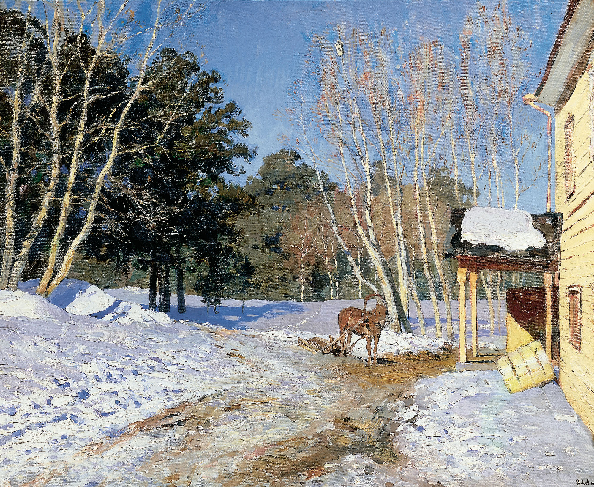 March. Март.